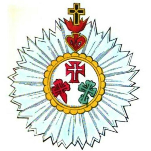 Gwiazda "Wstęgi Trzech Orderów"